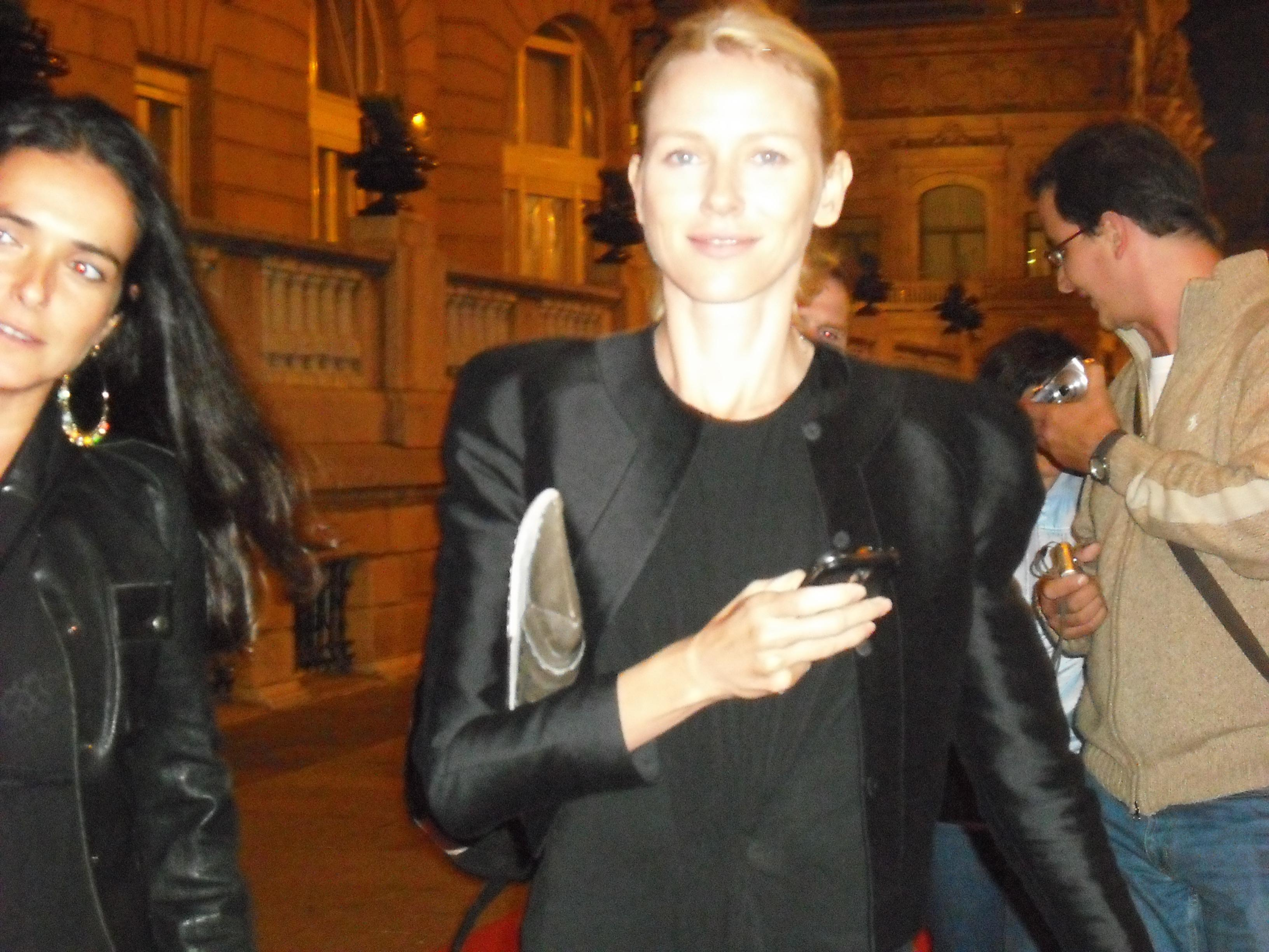 Naomi Watts caminando por la alfombra roja durante el Festival de Cine de San Sebastián.